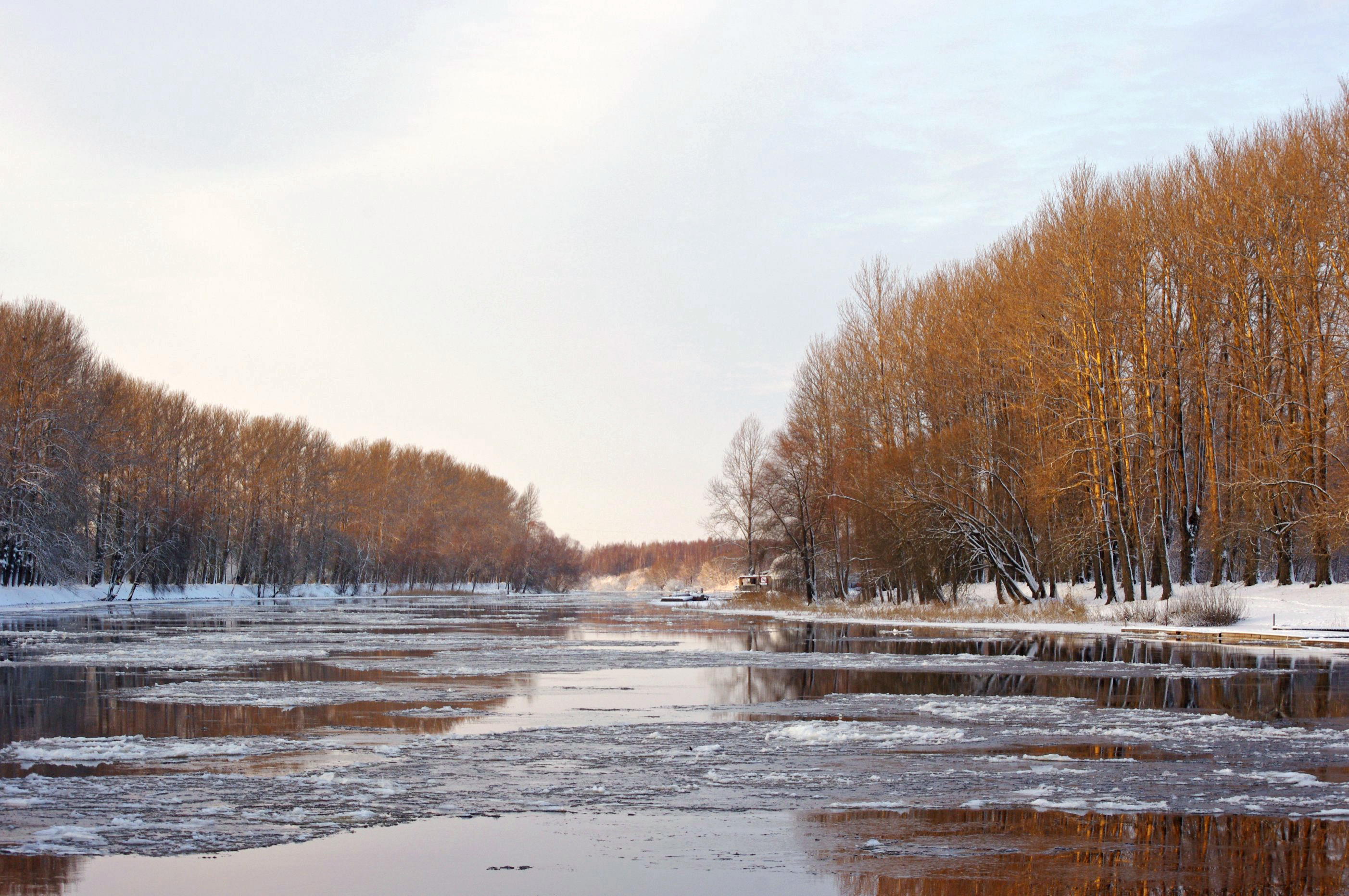 Jää tekkimine Emajõele, Tartu, 27. november 2010